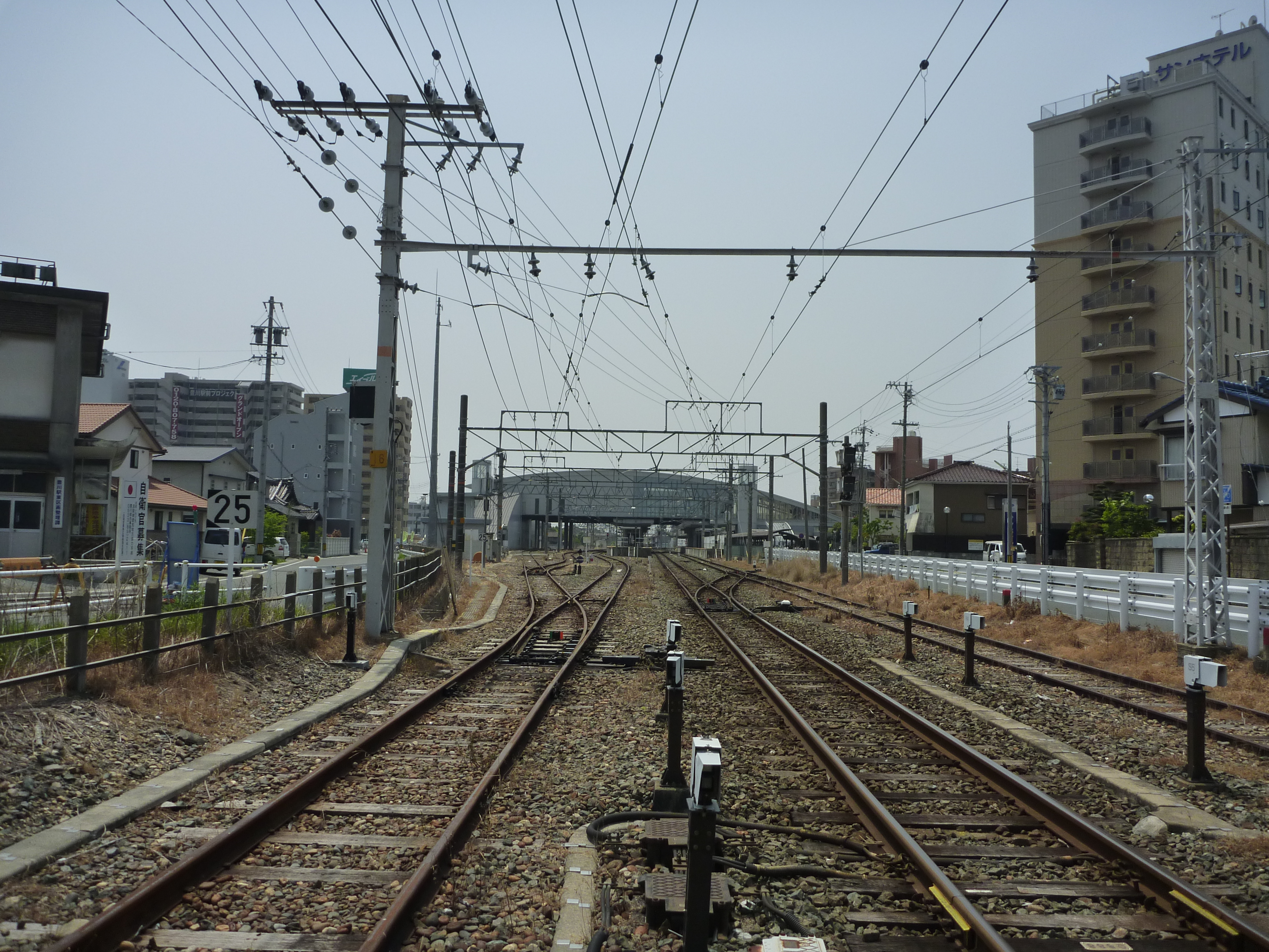 豊川駅